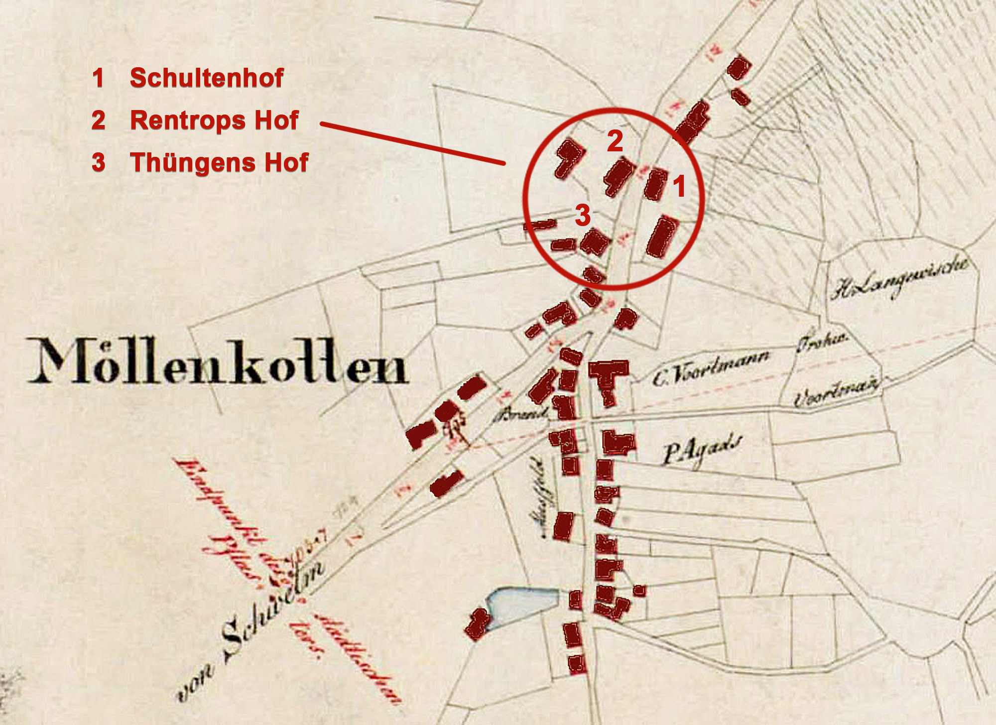 Ausschnitt aus Karte "Lageplan Verlegung der Milsper Straße von Möllenkotten bei Schwelm bis zur Enneper Straße, Blatt 1". Markierungen und Text (rot) wurden in das Originalwerk ergänzt.